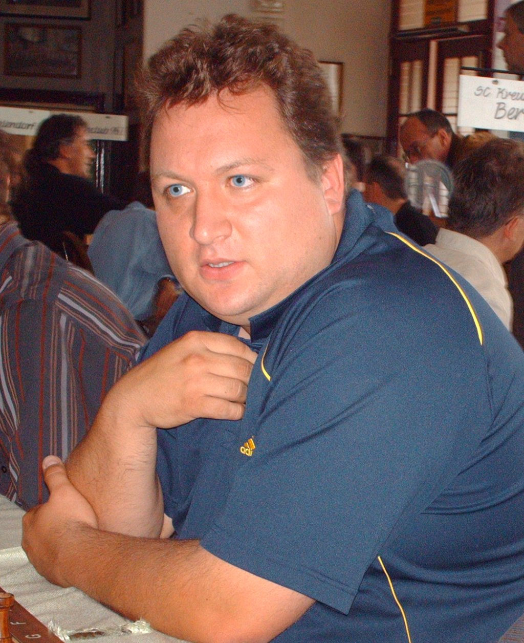 Robert Rabiega am 23. Juni 2007 beim 43. Rosengarten-Pokalturnier in Forst (Lausitz)